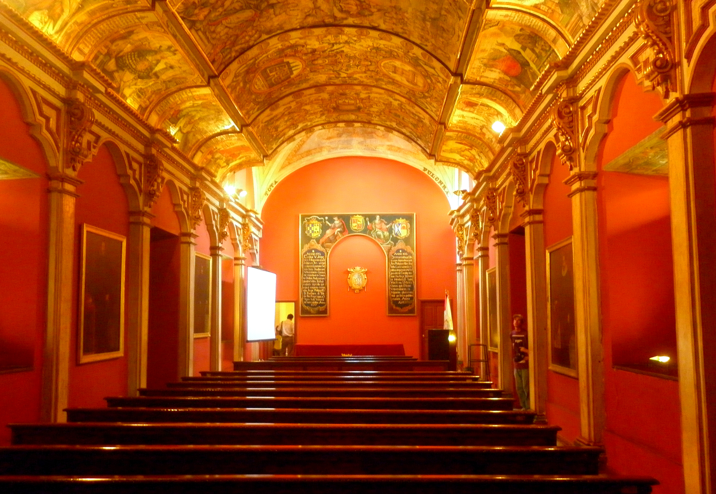 Salon de Grados de la Casona de la Universidad Nacional Mayor de San Marcos, Lima, Peru.